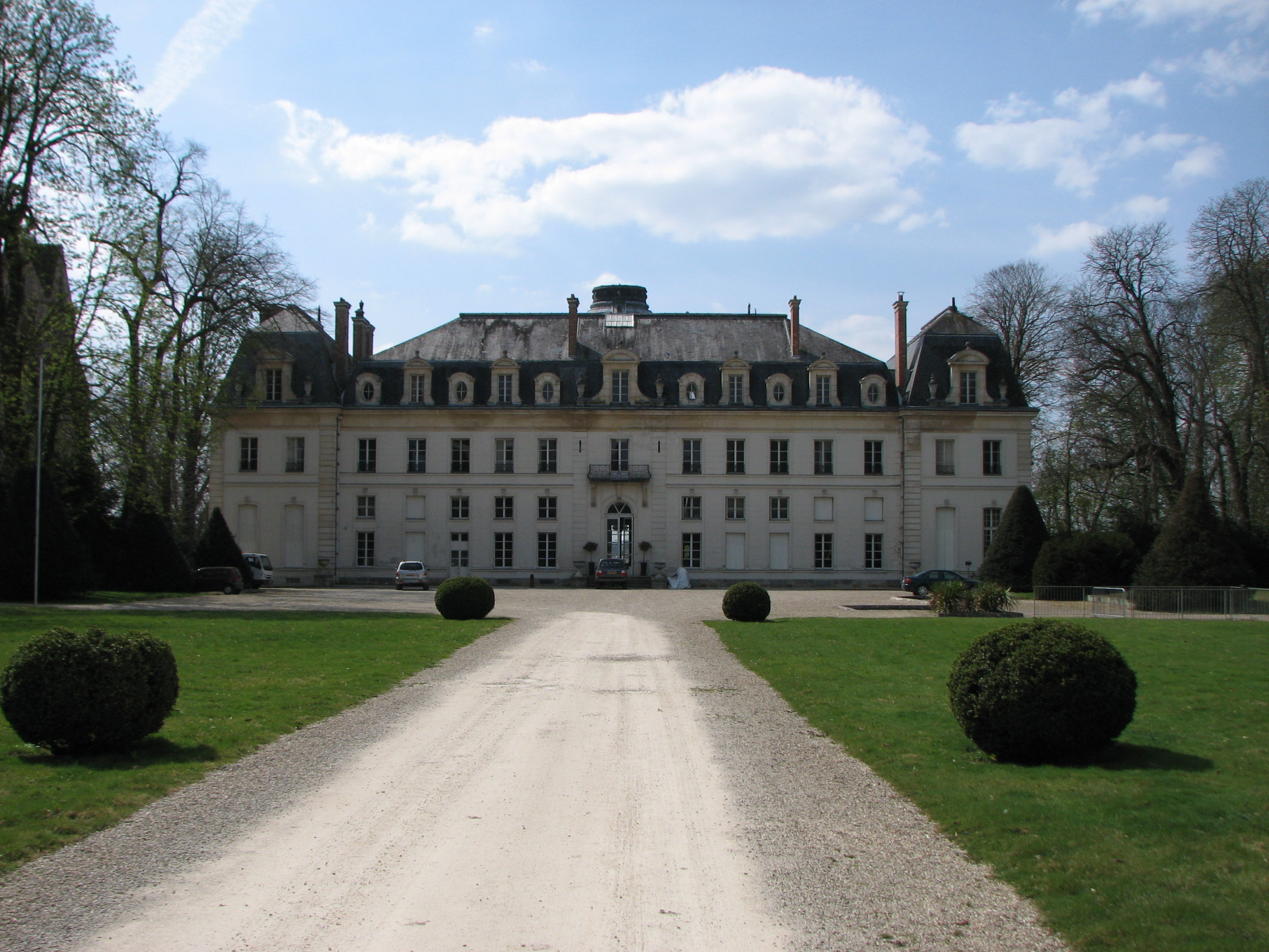 Château de Vaux-le-Pénil, Seine-et-Marne